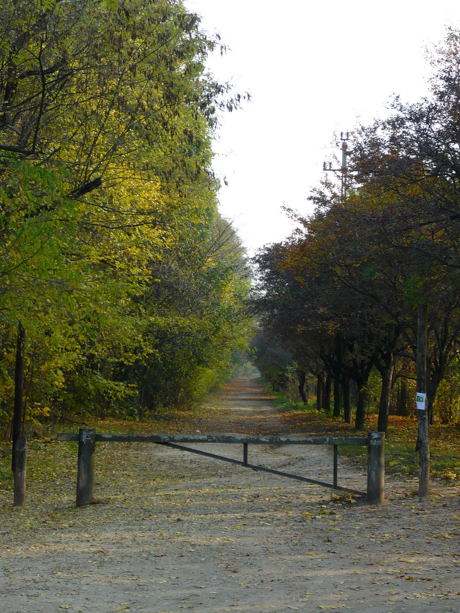 Kamaraerdő, Budapest, Hungary